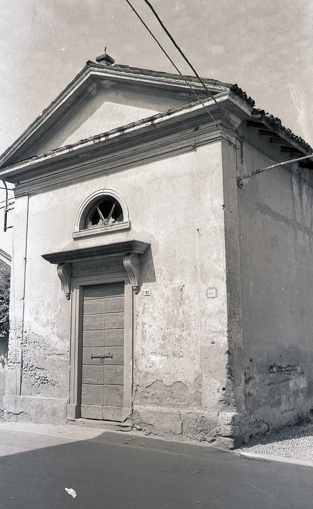 Scatto del dopoguerra dell'oratorio della Madonna del Rosario, in Cascina del Bruno, Arcore. Opera di Luigi Corini.